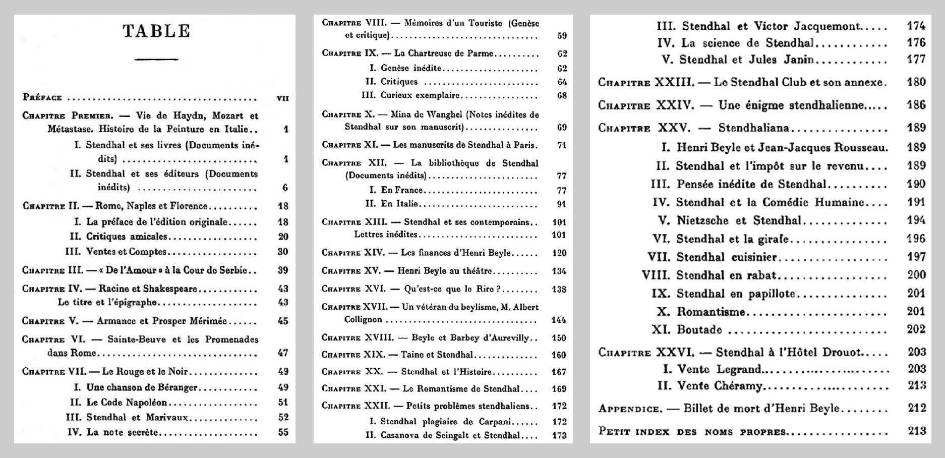 La Vie littéraire de Stendhal, Adolphe Paupe, table des matières, 1914